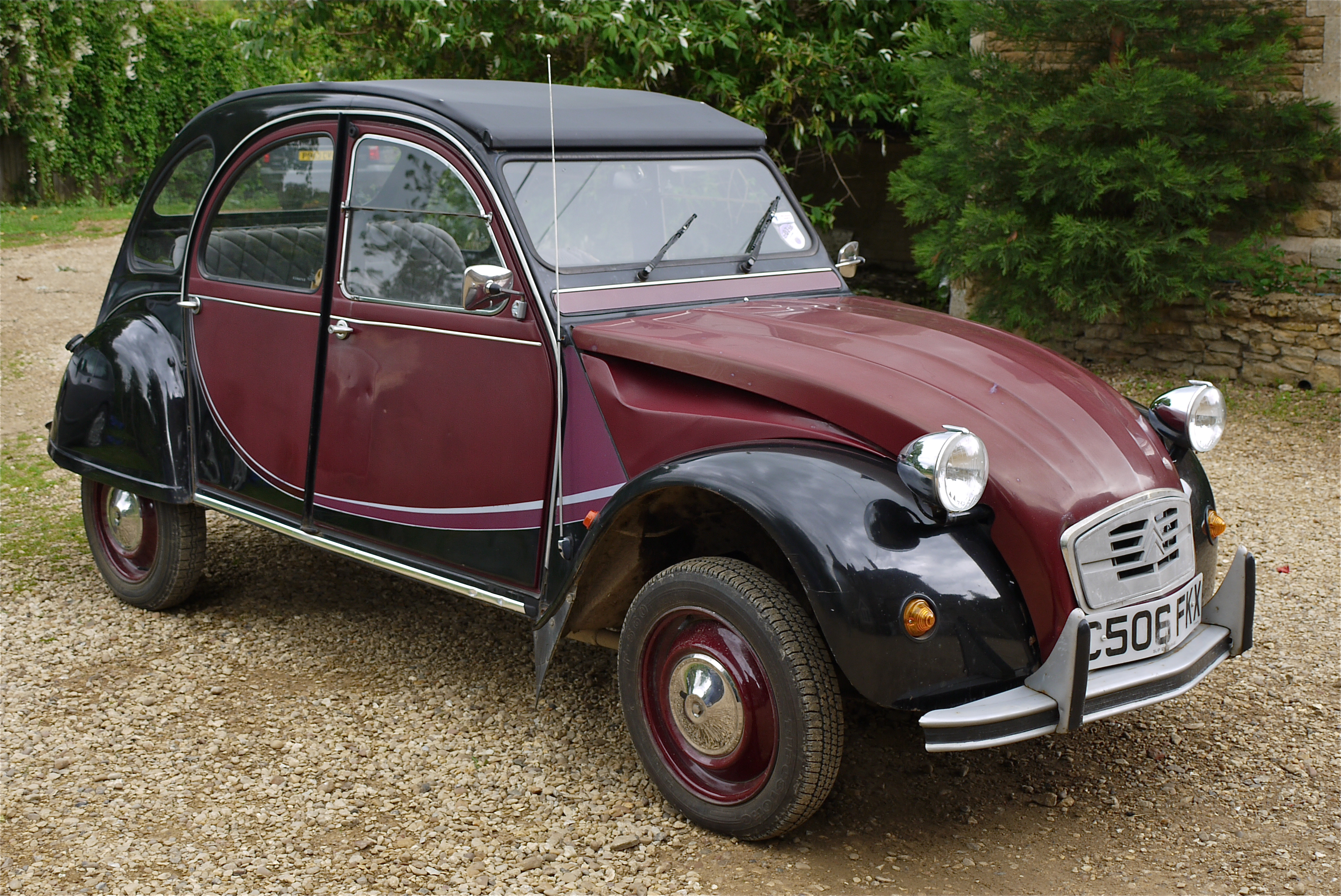 Citroen 2CV